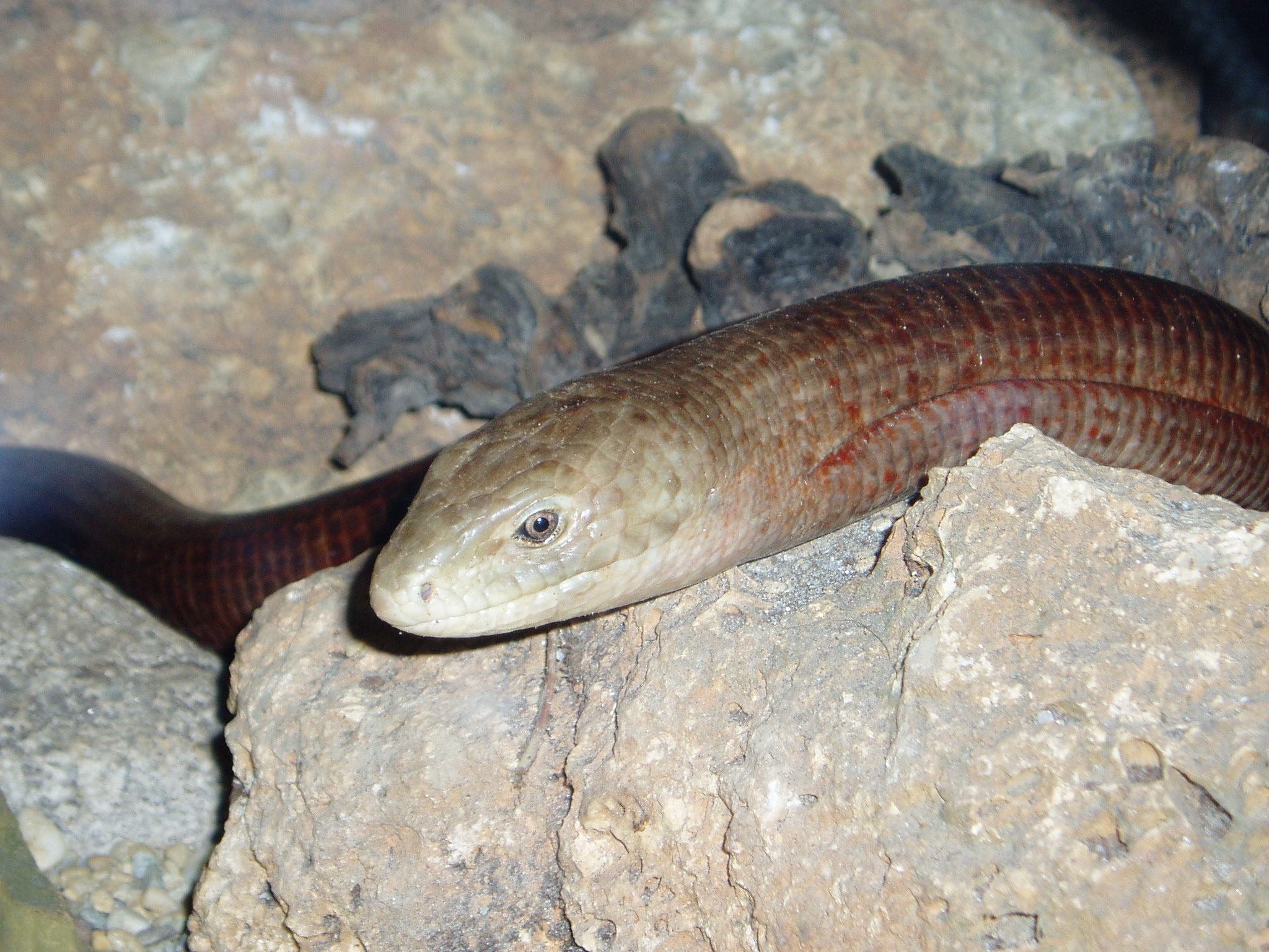 Zoo Zagreb